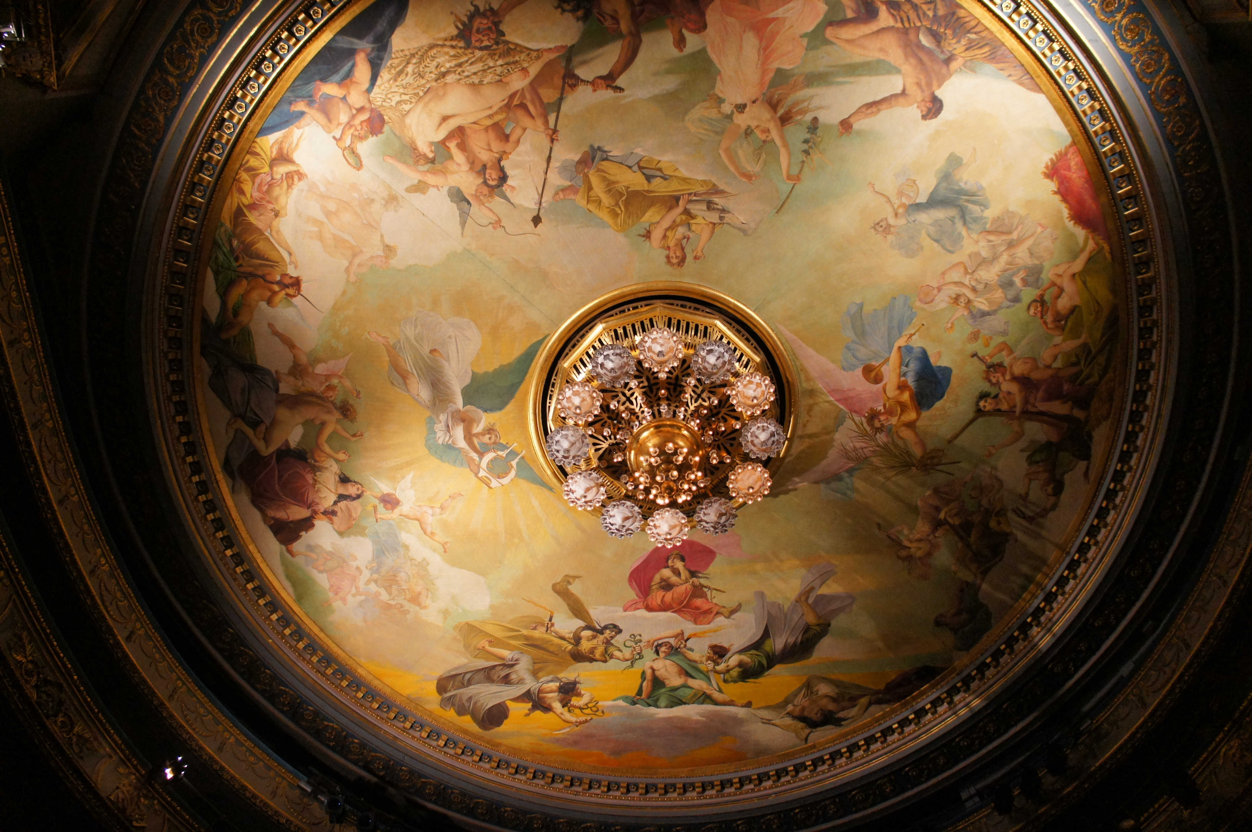 Théatre Graslin